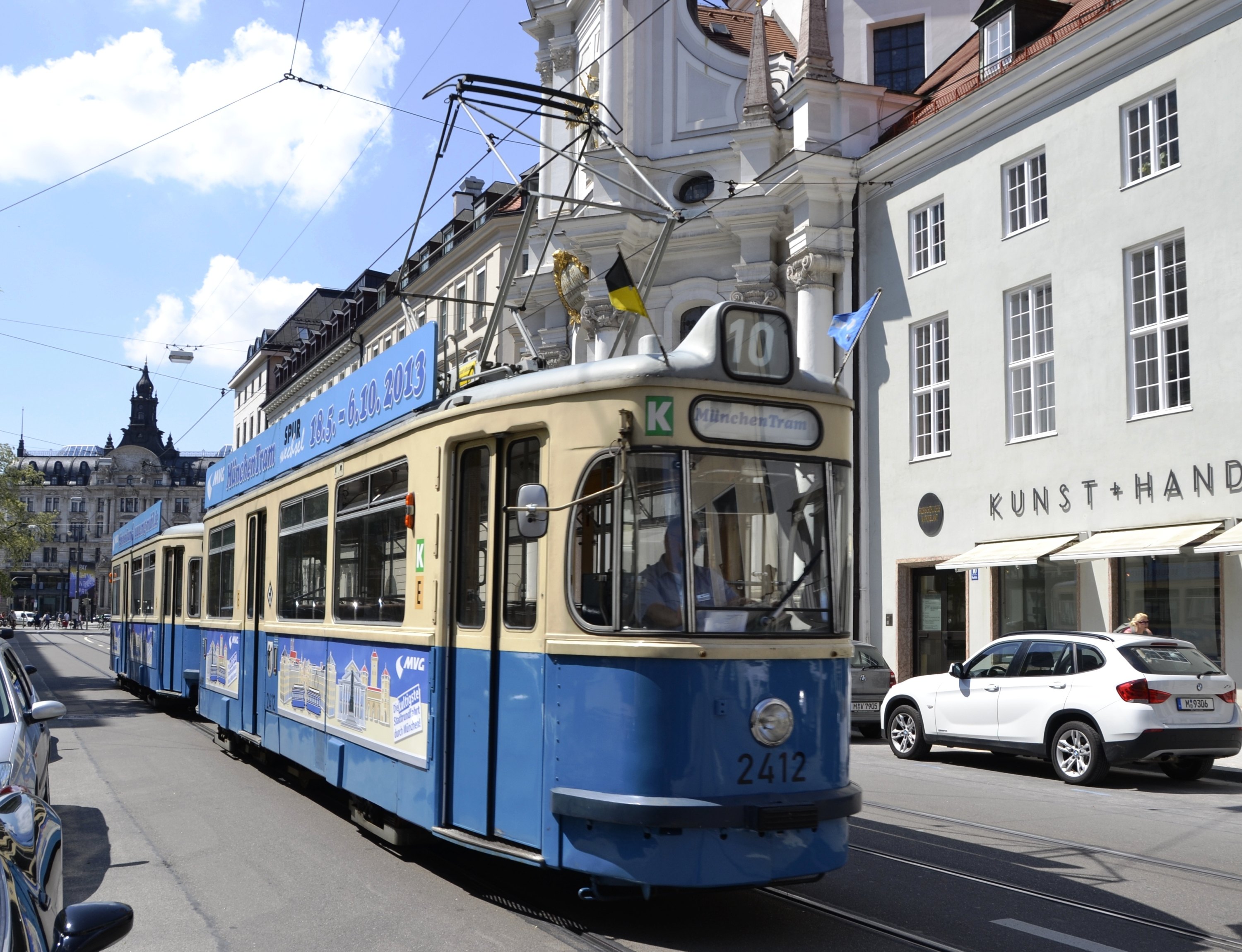 Die Stadtrundfahrt mit der Straßenbahn des Typs M "Münchentram".